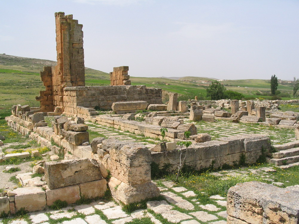 Ruines de la ville antique d'Althiburos